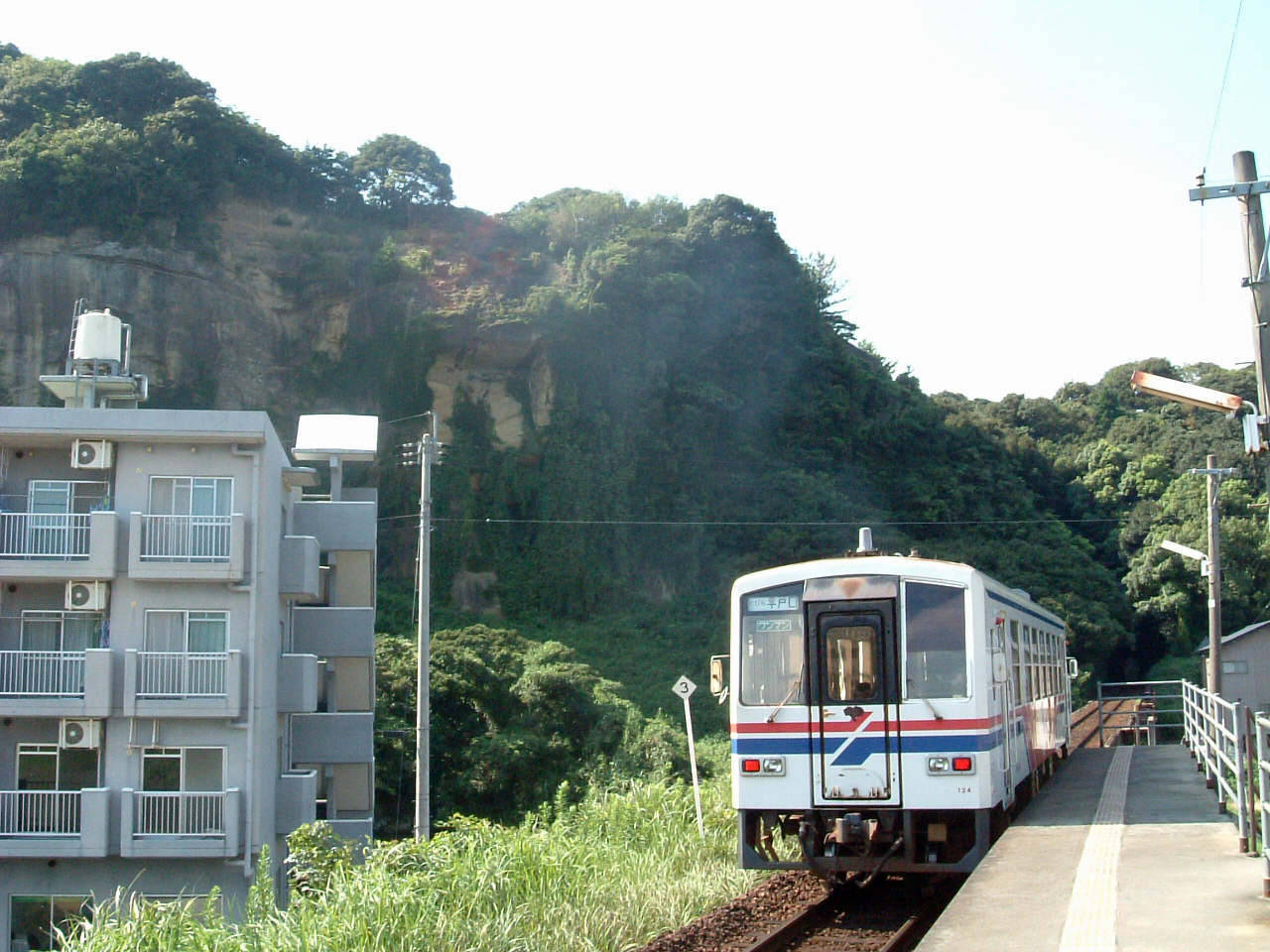 松浦鉄道高岩駅と平戸八景・高巌(Takaiwa Station With Takaiwa,one of the Hirado-Hakkei)